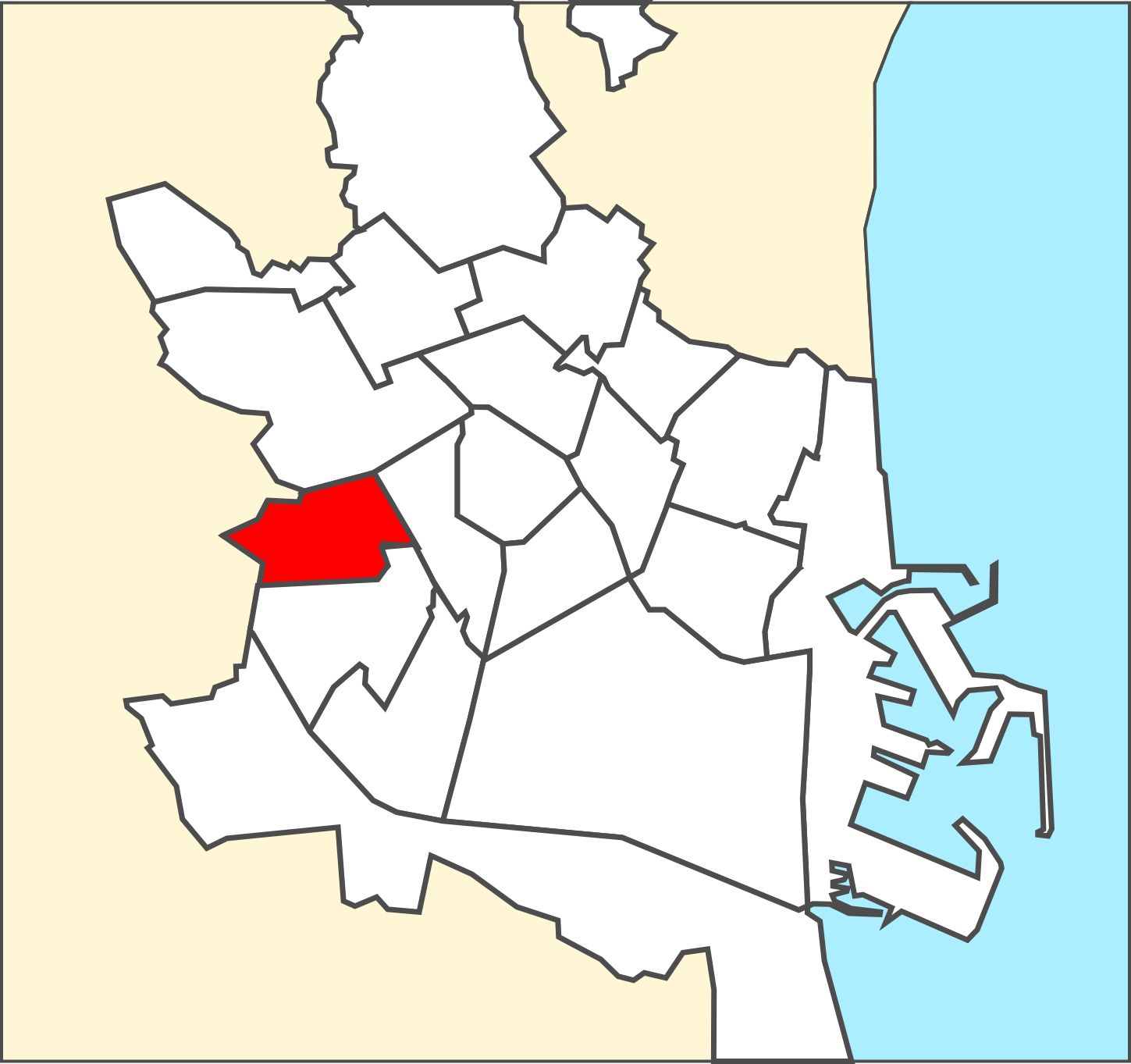 Districte de L'Olivereta.